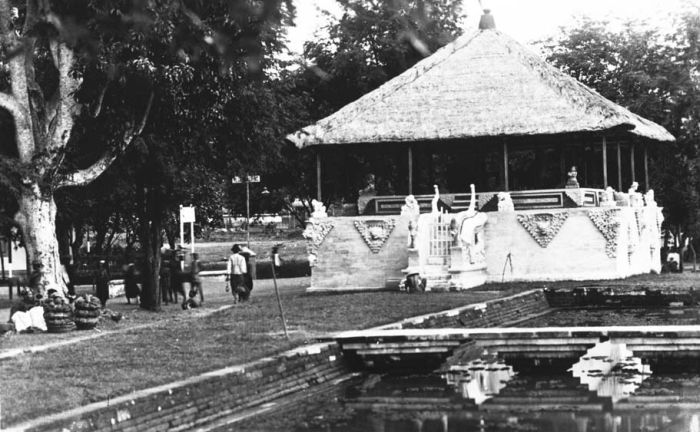 Foto. Gebouwtje voor samenkomsten in Kloenkoeng, Bali